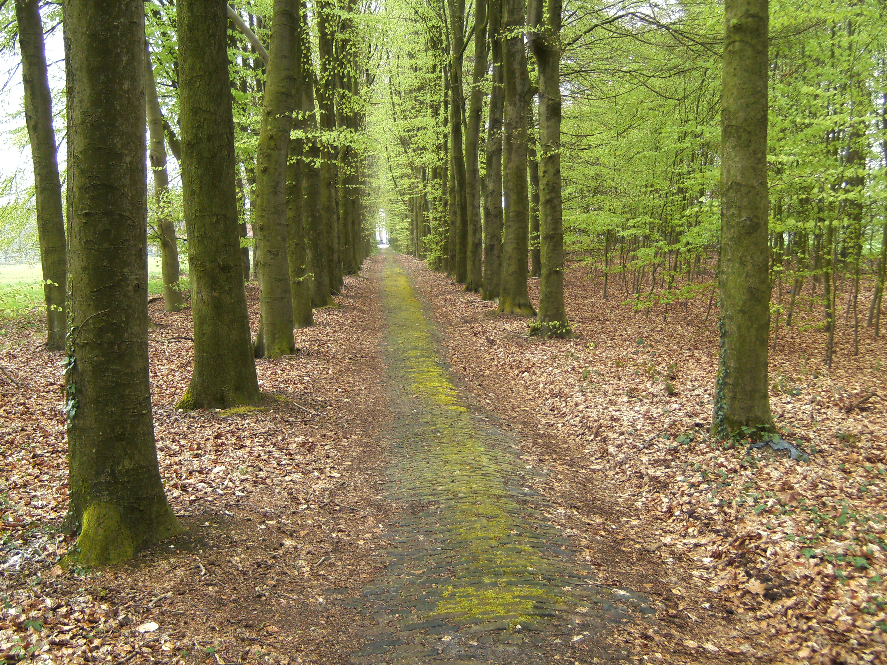 Landgoed Boxbergen bij Deventer. Estate Boxbergen near Deventer.